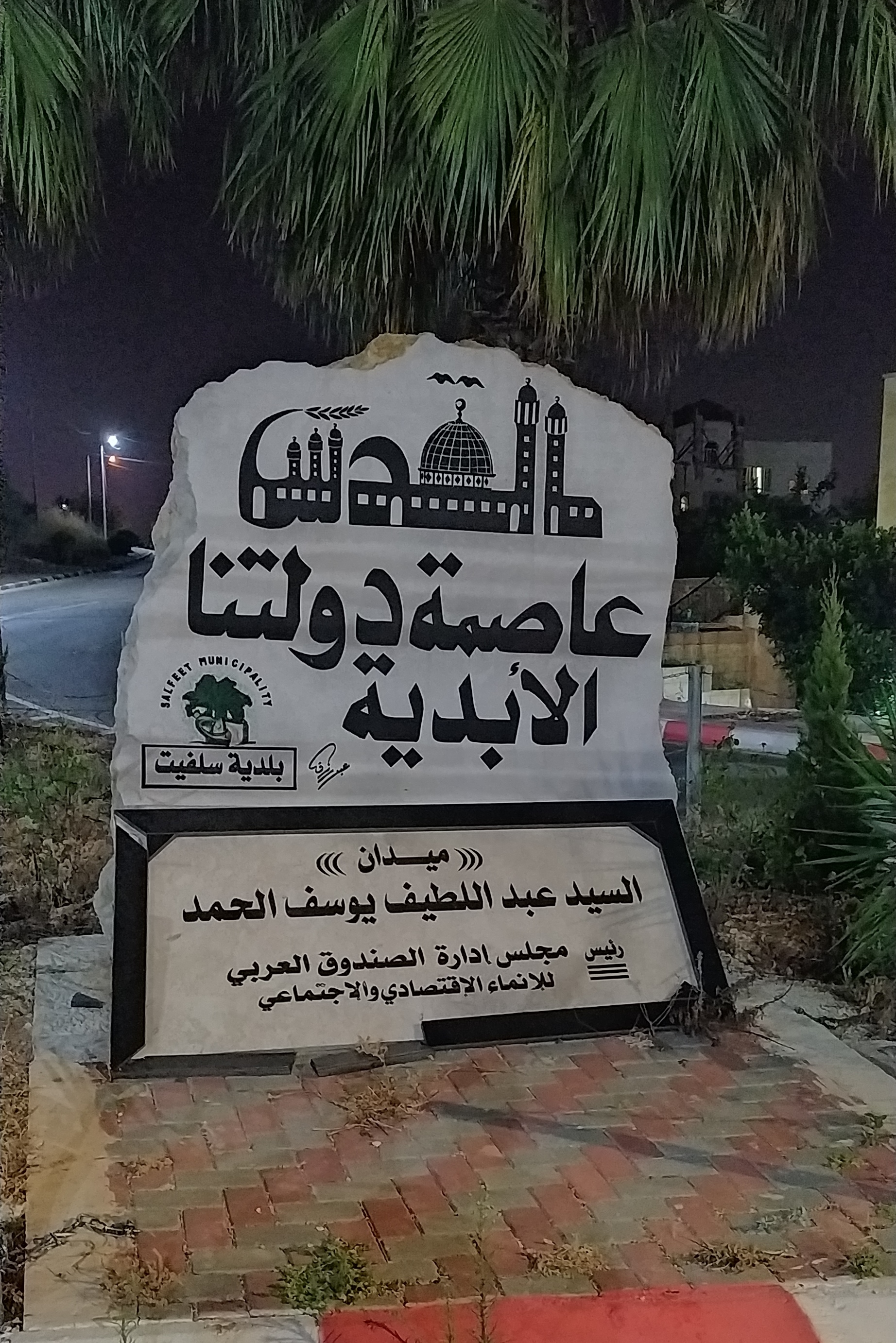 ميدان القدس في مدينة سلفيت، تقاطع شارعي جمال عبد الناصر وأم القرى